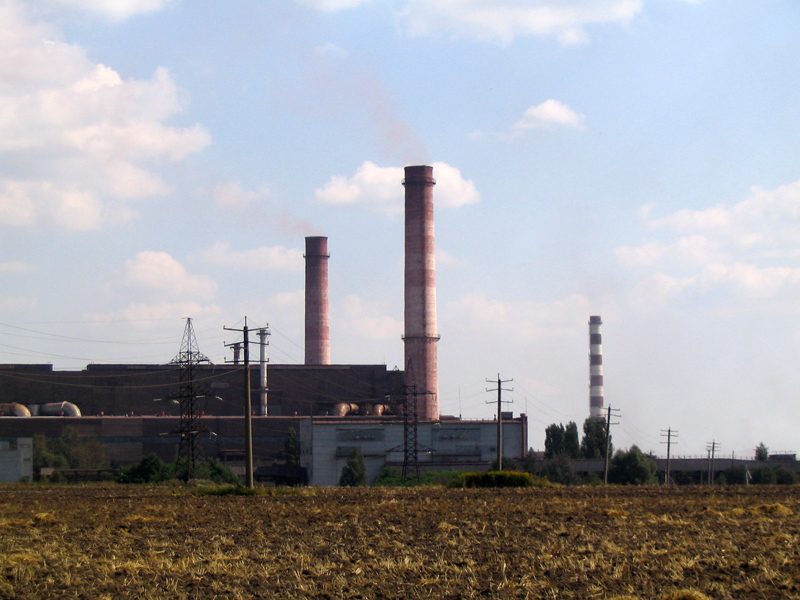 MGOK